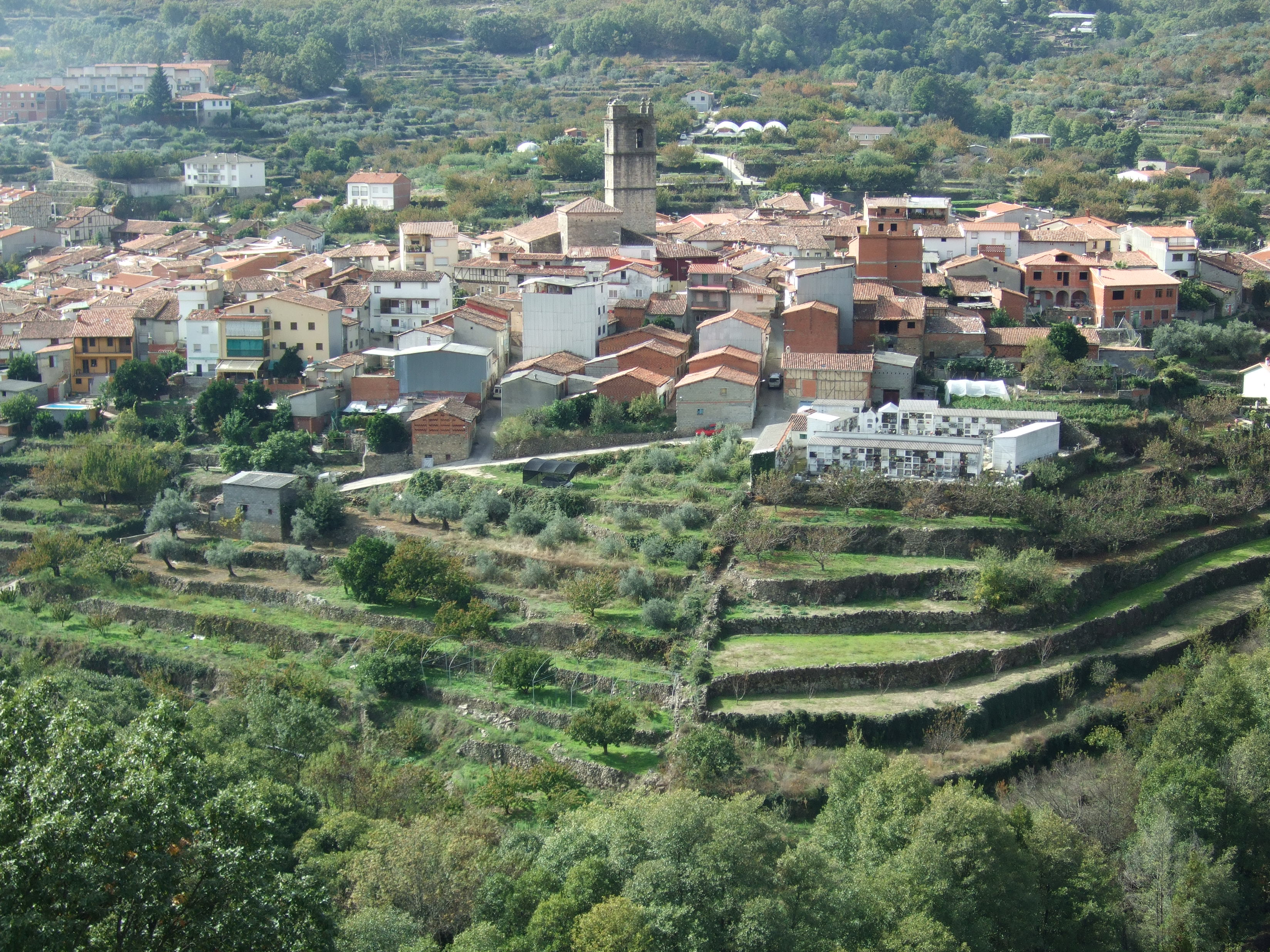 Vista desde el mirador de la Serrana, en la carretera que une Garganta la Olla con el Monasterio de Yuste